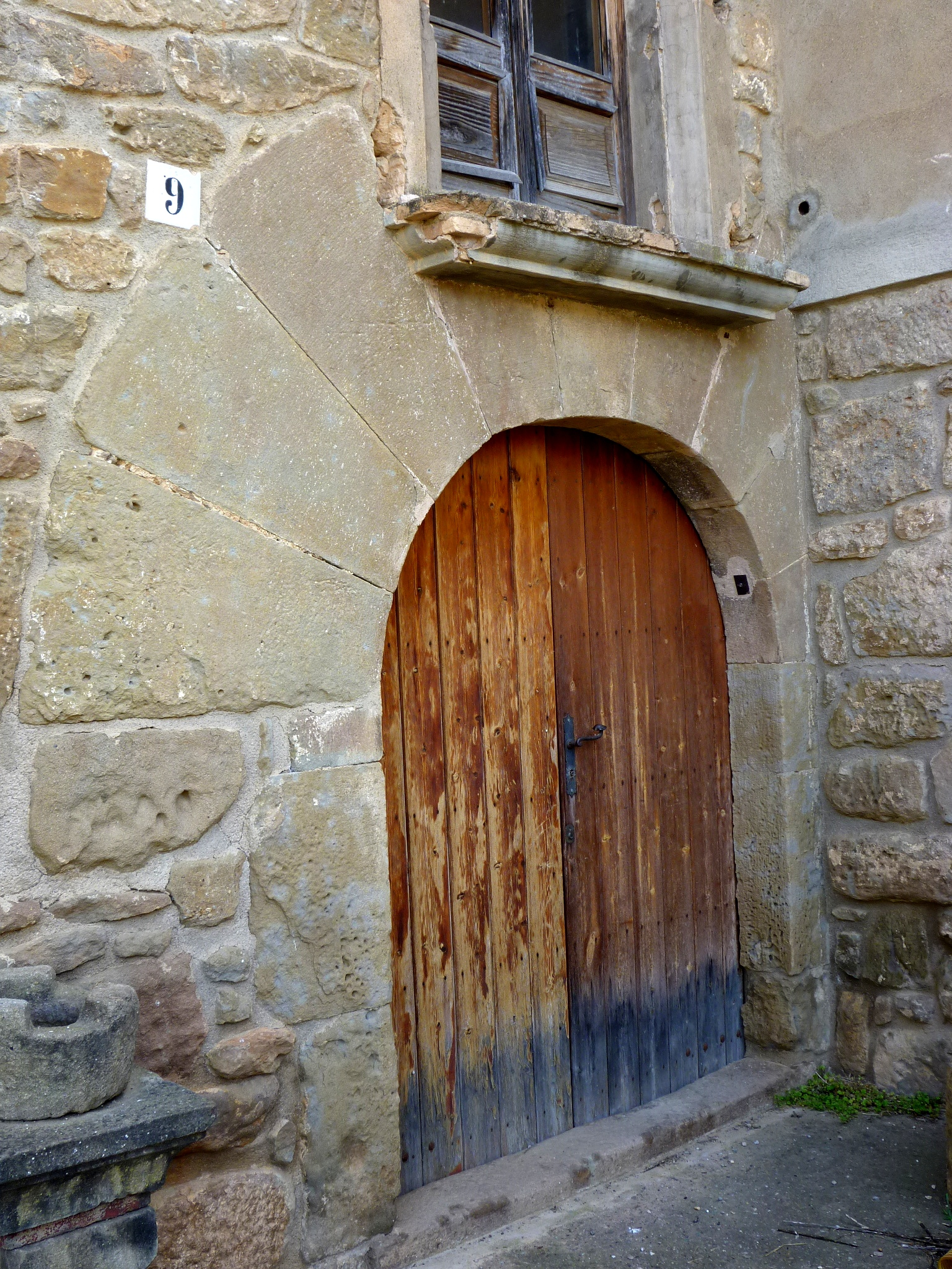 Masia de Bajona (Clariana de Cardener): portañ